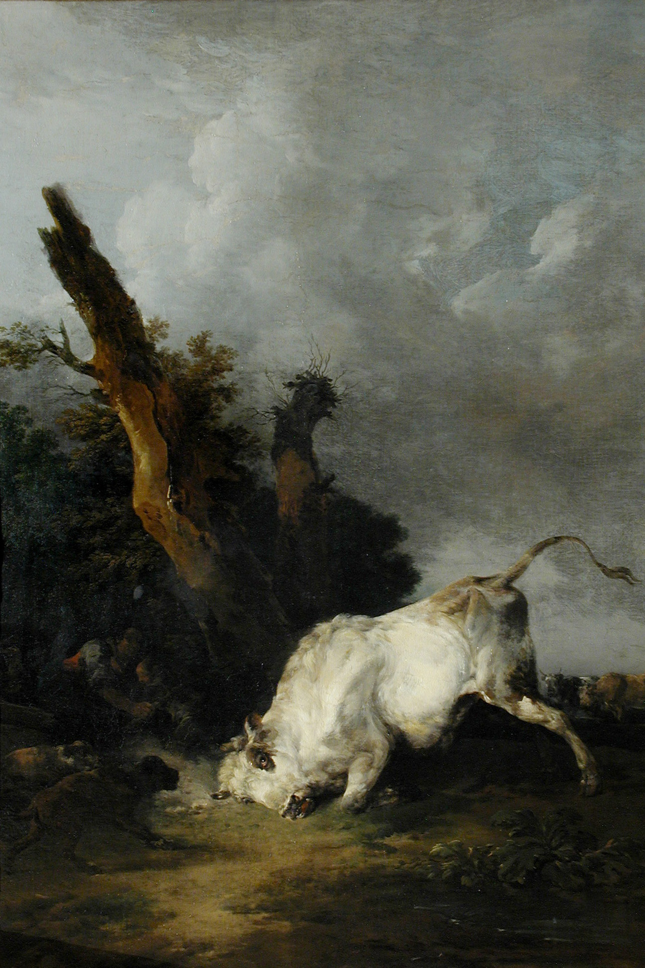 Палатно, алей. 142х107